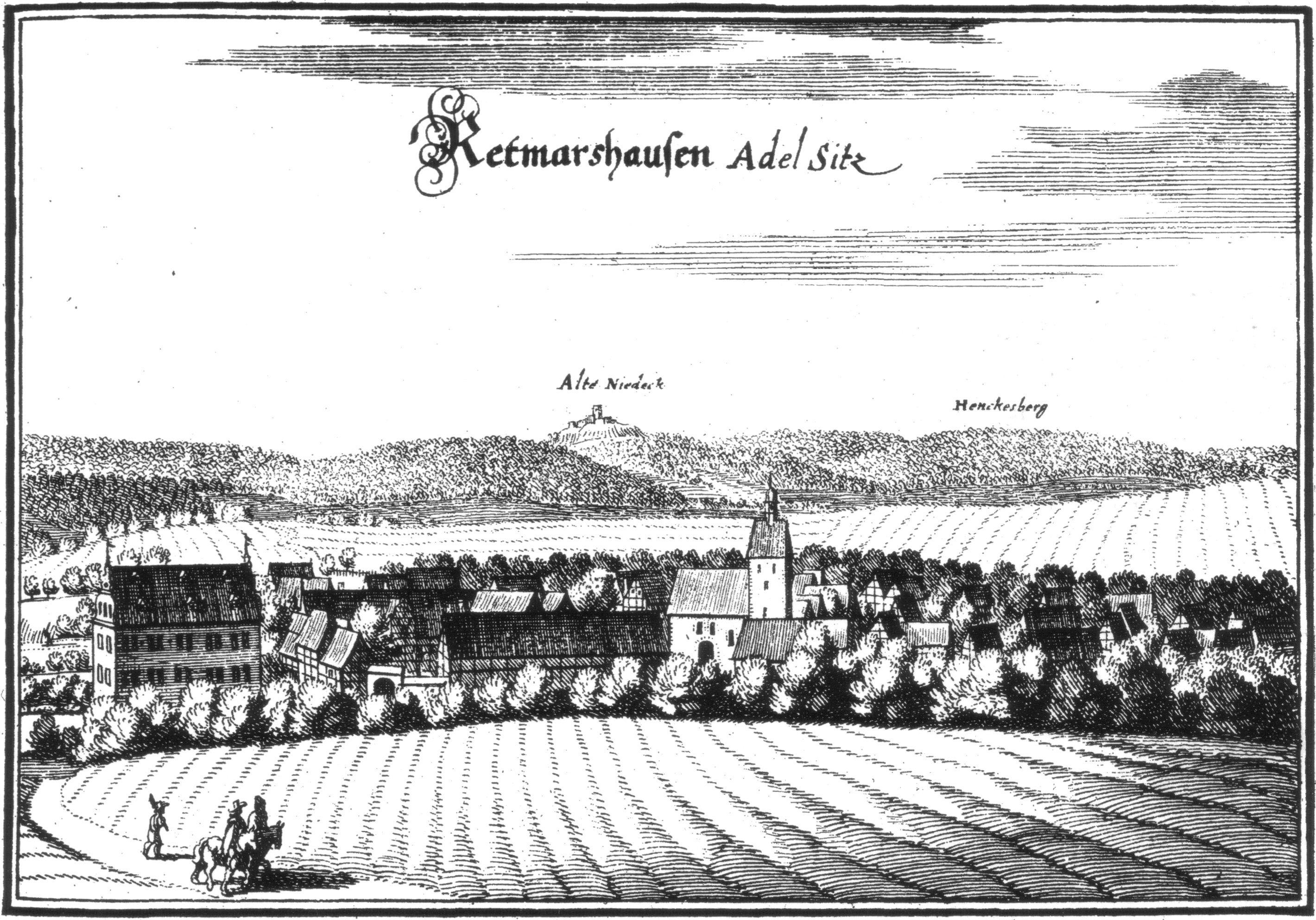 Blick von Südosten auf Rittmarshausen, Gemeinde Gleichen, Landkreis Göttingen. Links vorne der Gutshof, im Hintergrund mittig die Burgruine Alte Niedeck auf dem Kronenberg bei Niedeck, heute zu Gleichen-Groß Lengden. Kupferstich bei Matthäus Merian